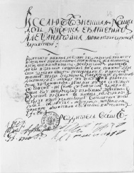 Письмо А. Д. Меншикова дочери Екатерине от 15 апреля 1720 г.